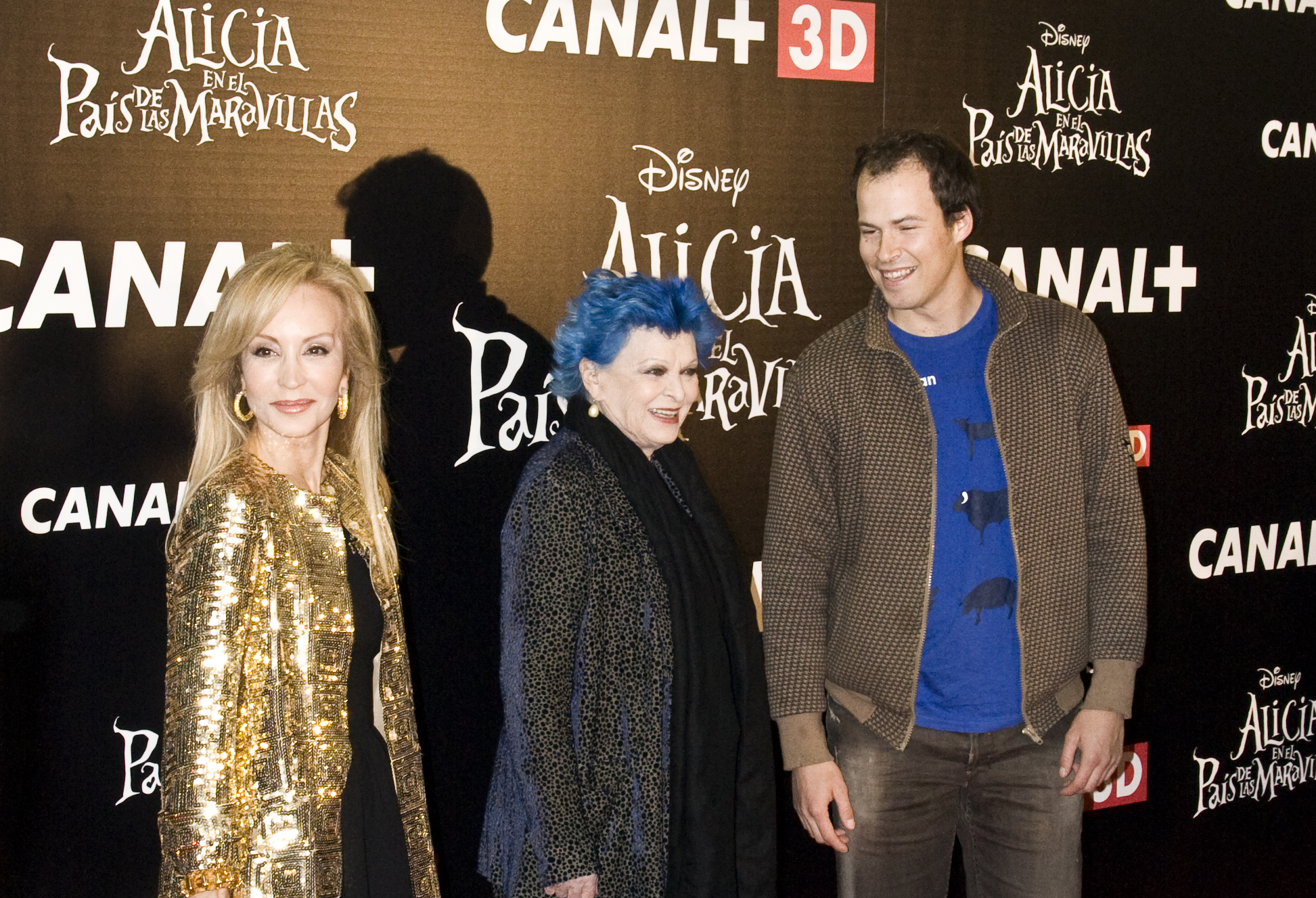 Carmen Lomana - Olfo - Lucía Bosé [?]